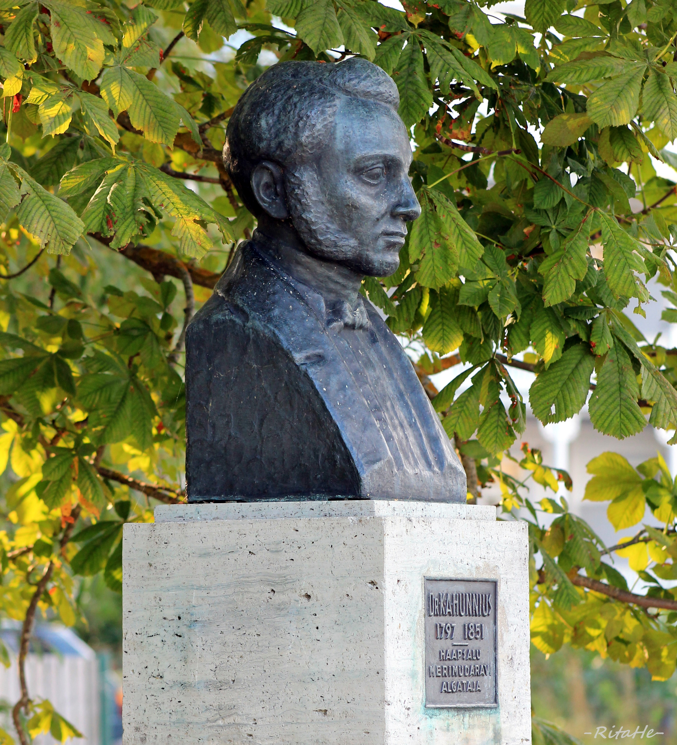 Carl (Karl) Abraham Hunniuse monument Haapsalu rannapromenaadil